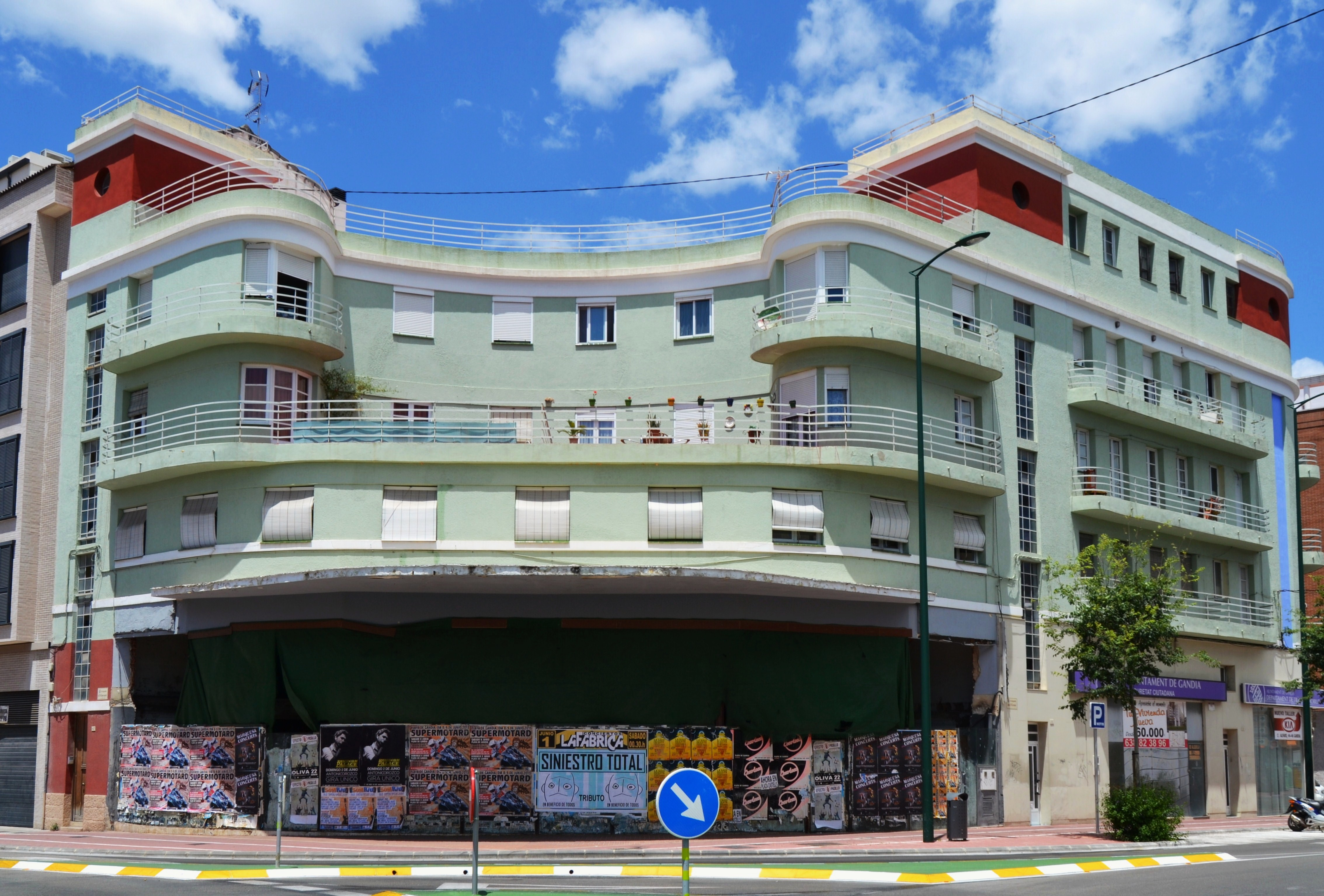 Edifici La TASA, Gandia.